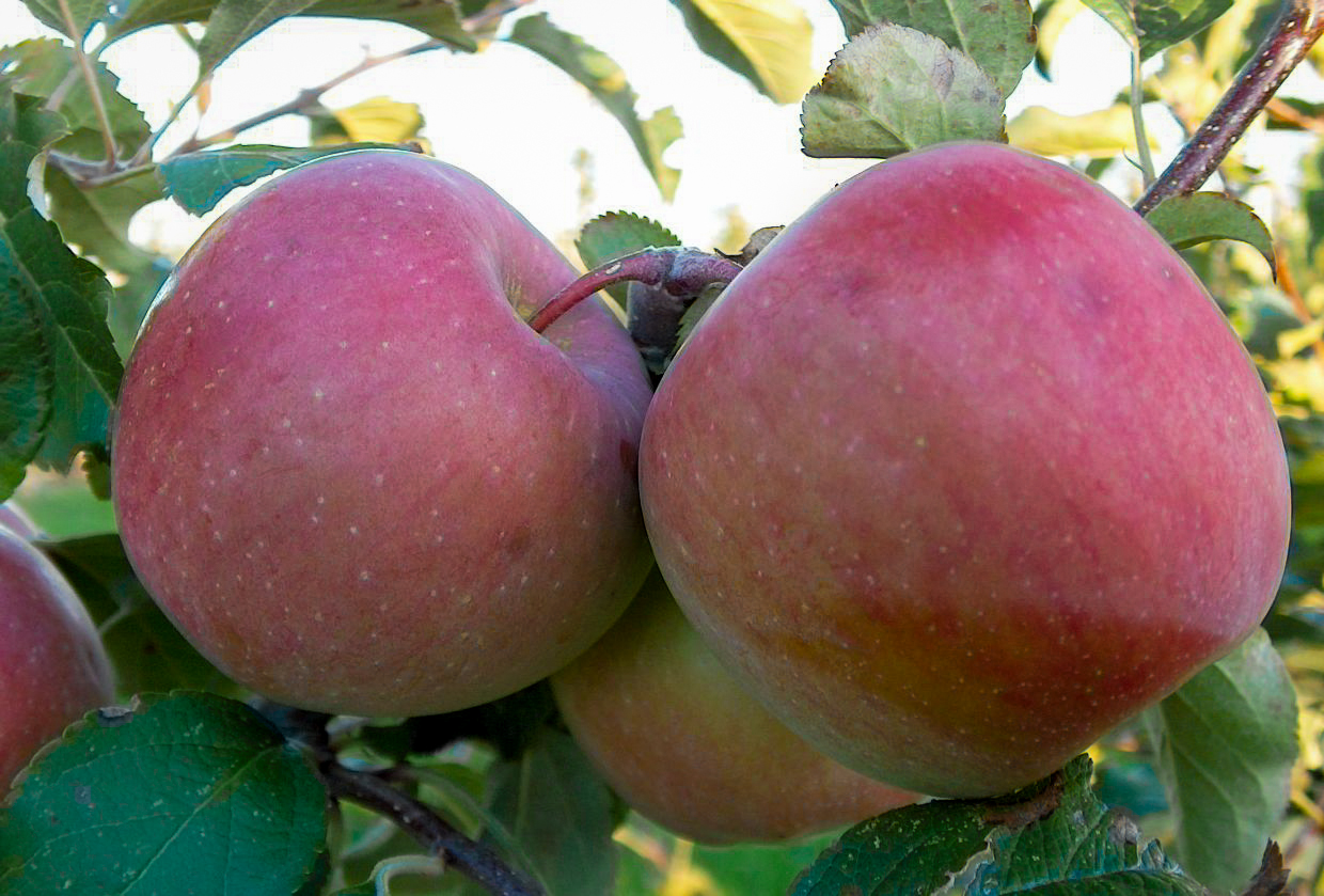 Apfel der Sorte Fuji Kiku